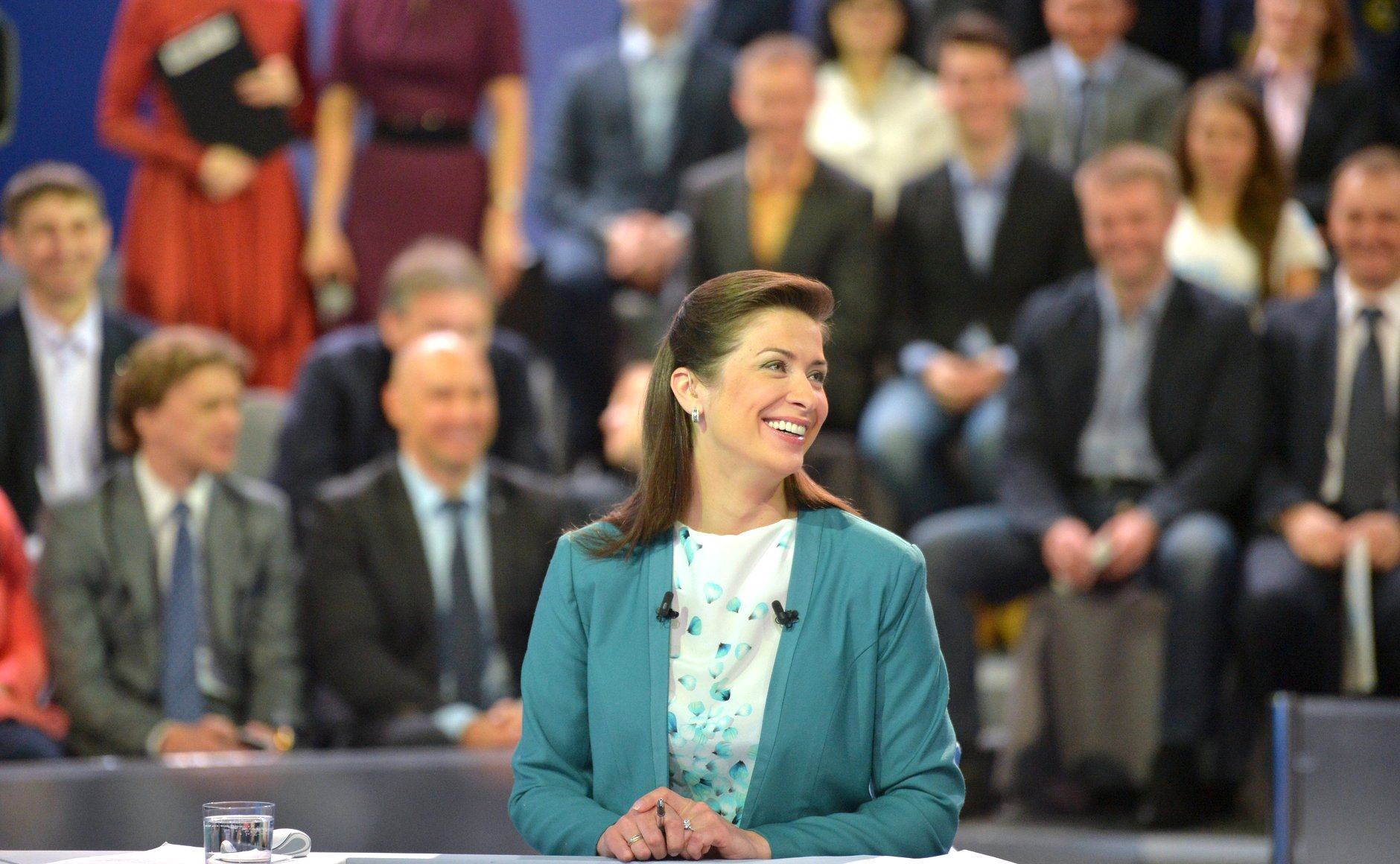 Прямая линия с Владимиром Путиным. Мария Ситтель